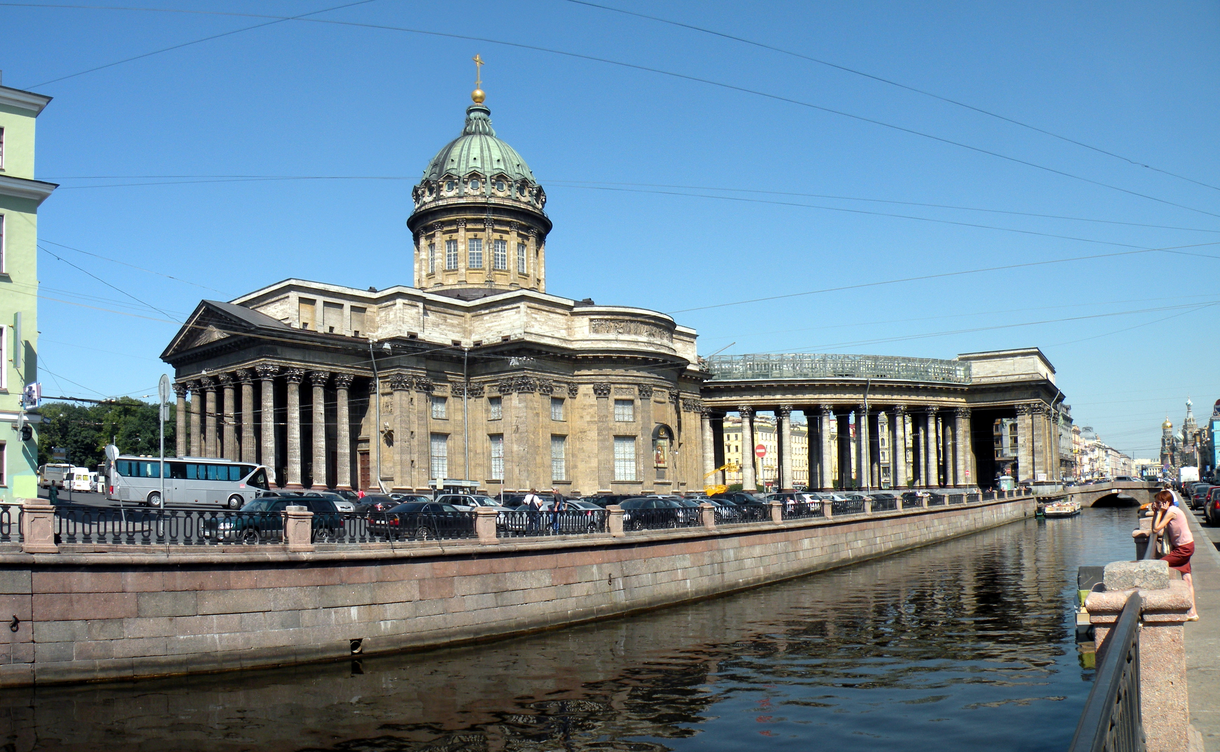 Казанский собор и канал